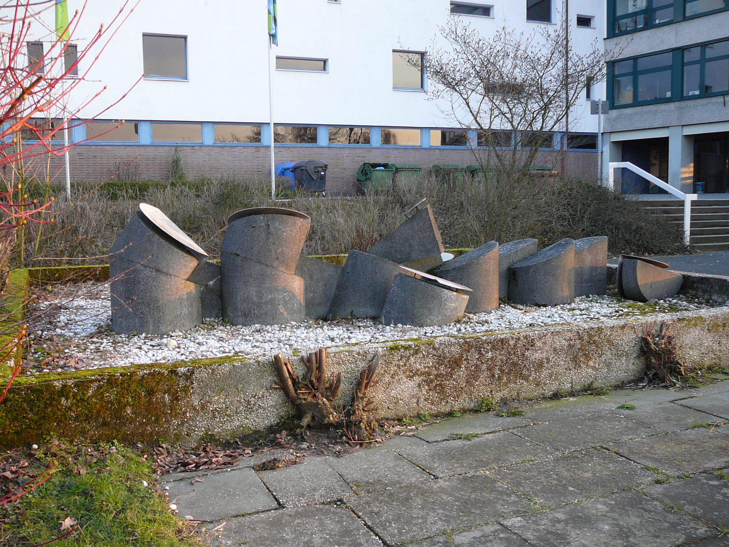 Wasserspiel am Schulzentrum am Kothen, Rudolf-Steiner-Straße, Wuppertal